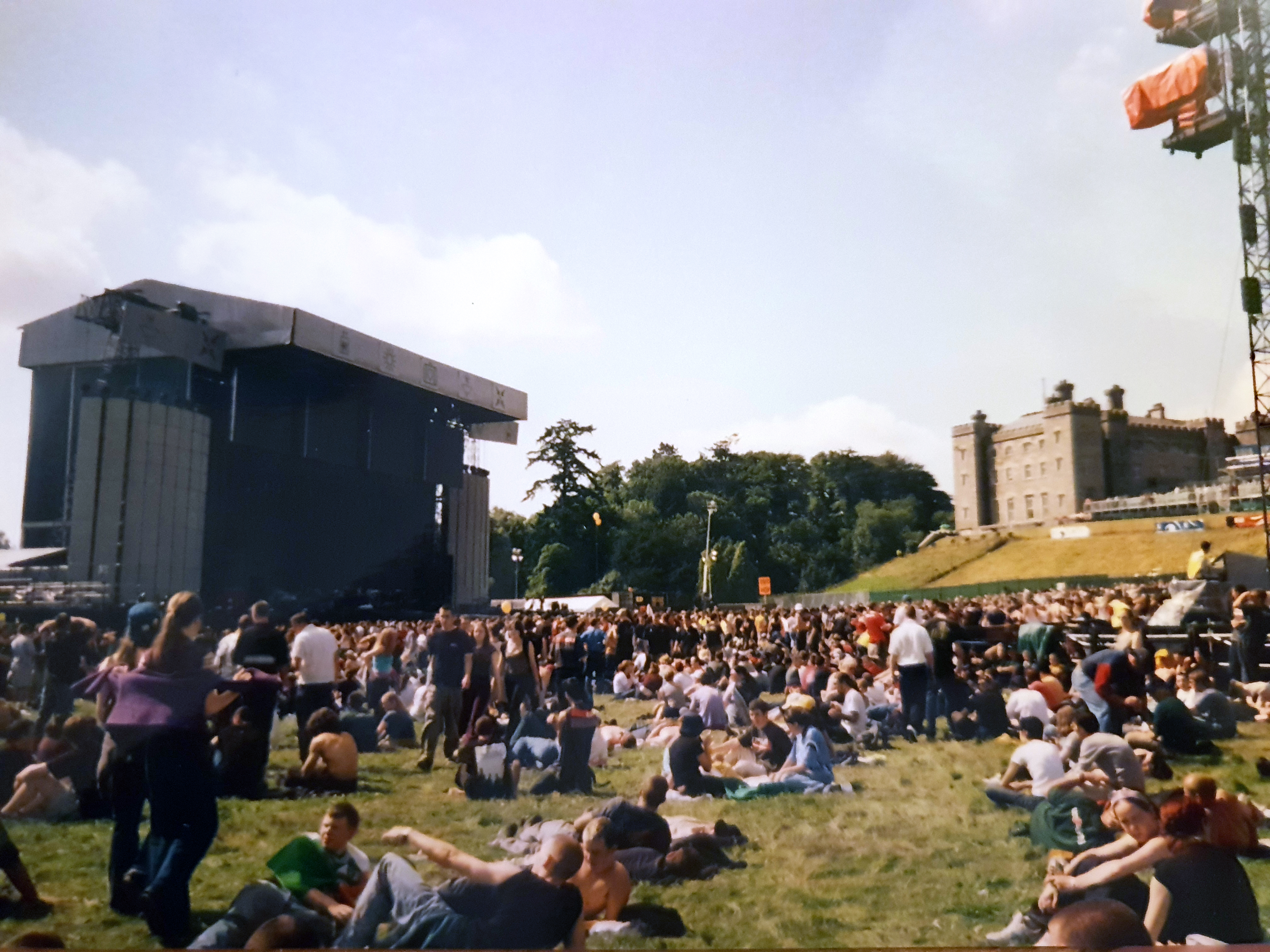 Ceolchoirm U2 ag Sláine Lúnasa 2001 Grianghraf: Sara Einarsson